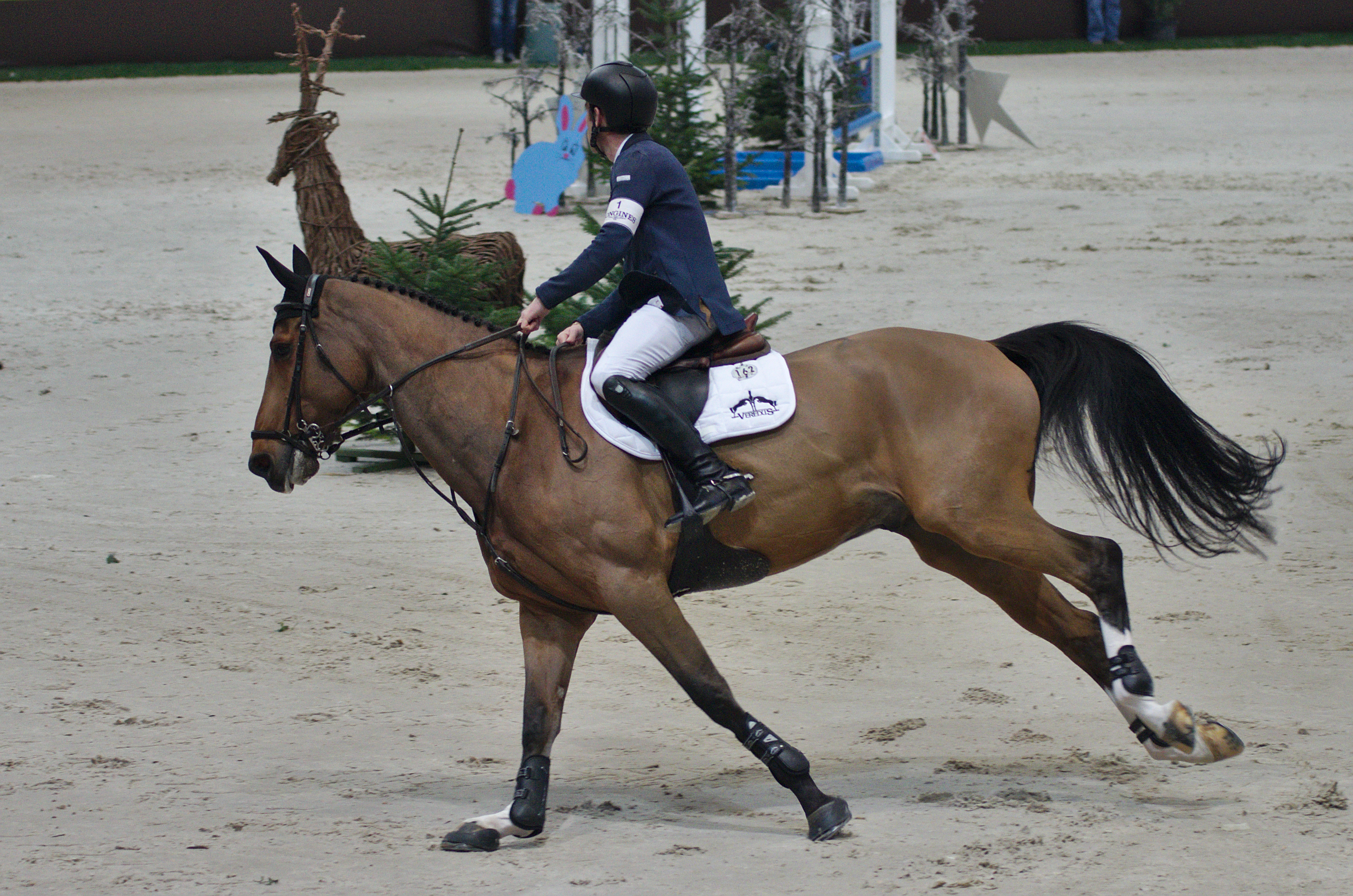 54eme CHI de Genève - 20141212 - Scott Brash et Hello Sanctos